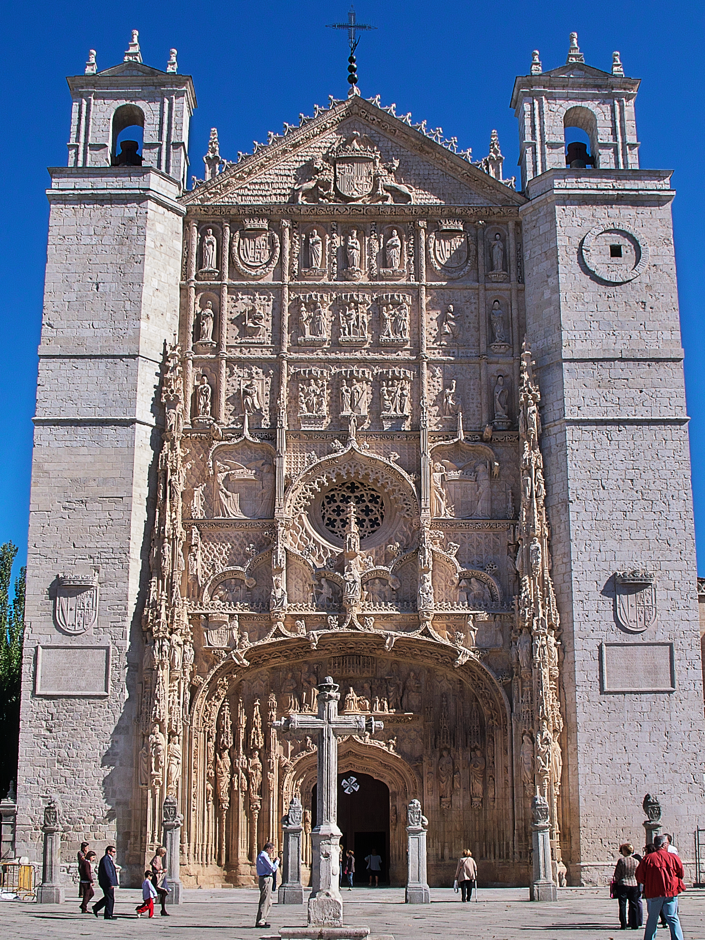 Hastial occidental de la iglesia. Posiblemente entre los retablos pétreos mayores de España.